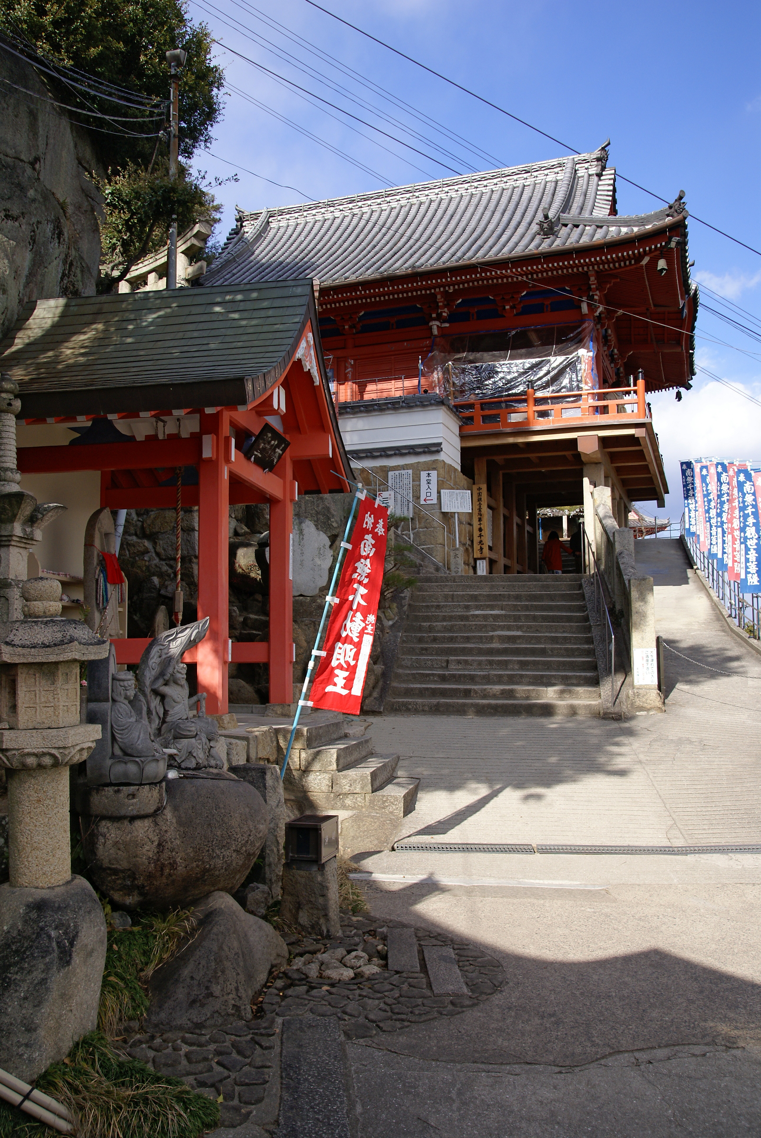 Senkoji in Onomichi, Hiroshima prefecture, Japan